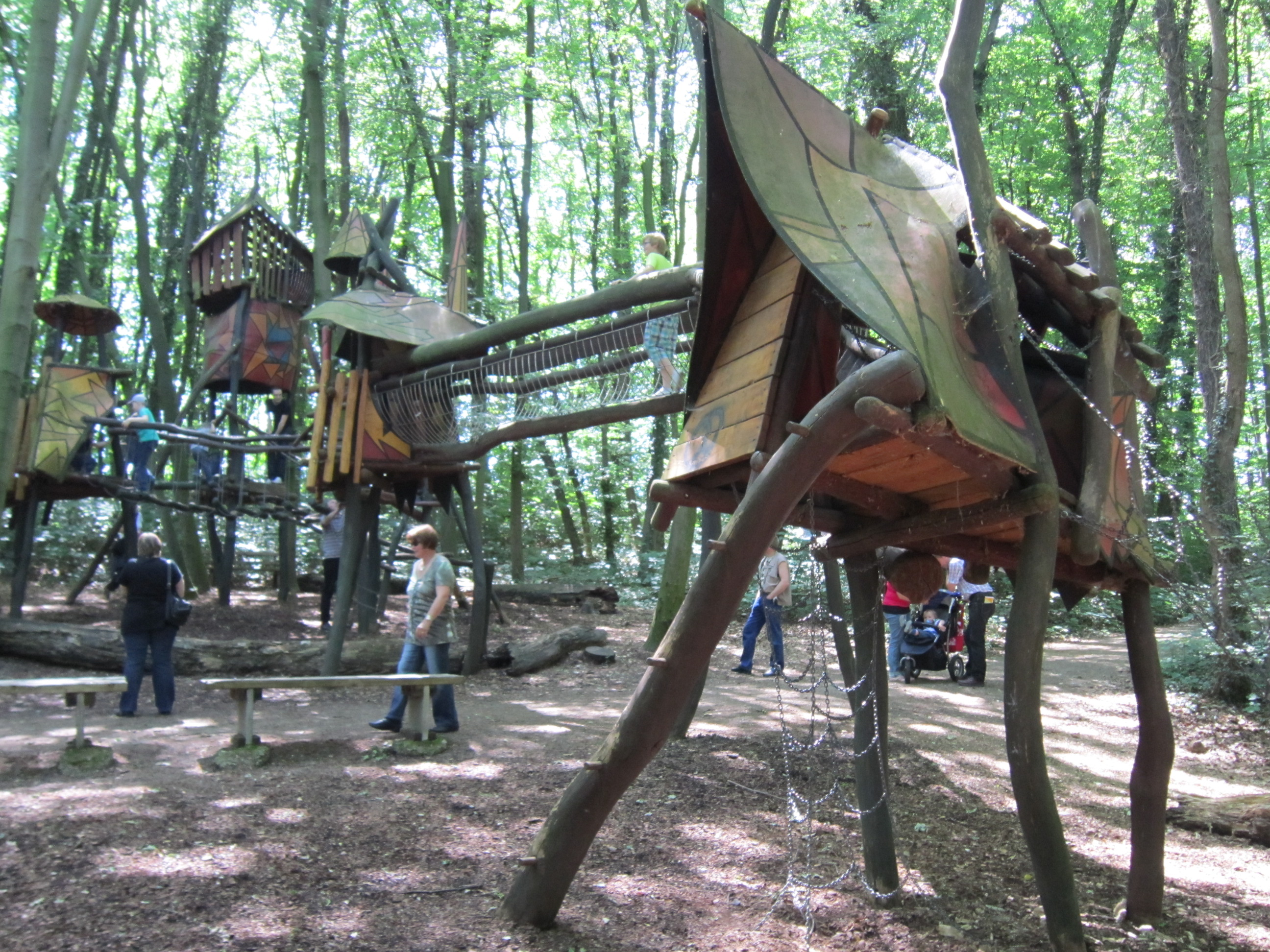 Vierjahreszeitenpark Oelde auf dem Gelände der Landesgartenschau NRW 2001; Waldspielplatz